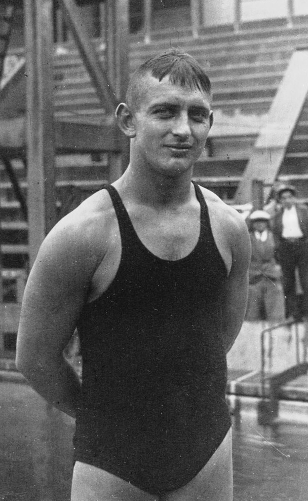 Les Tourelles : Championnats d'Europe : Riedschager, 1er du concours de plongeon : [photographie de presse] / Agence Meurisse